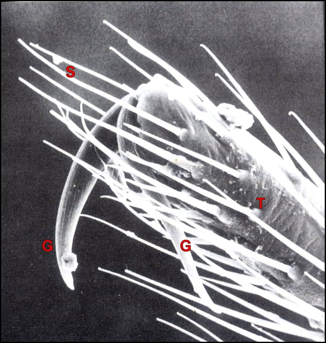 Griffes d' Arachnocoris karukerae (Guadeloupe) vues au microscope électronique à balayage